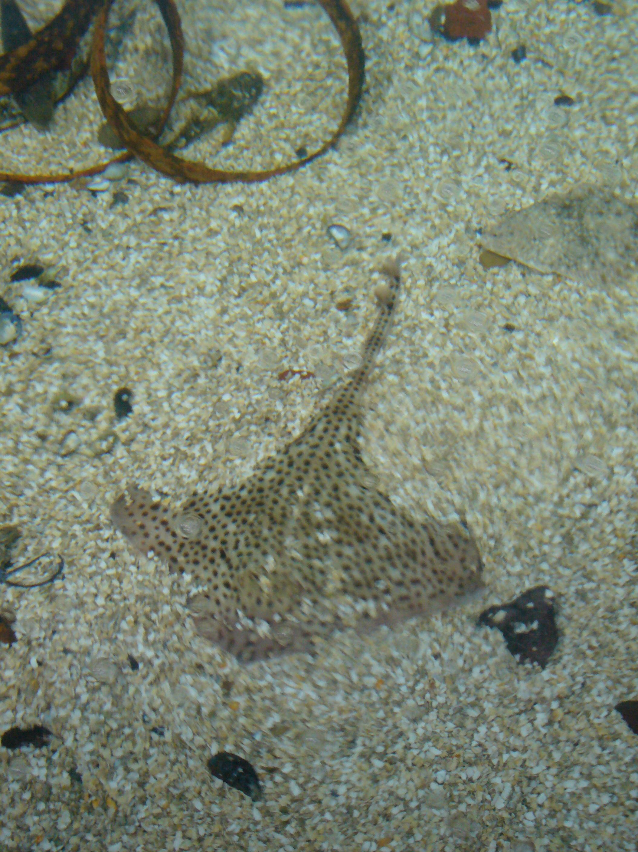 Summary Raja montagui (Gefleckter Rochen)